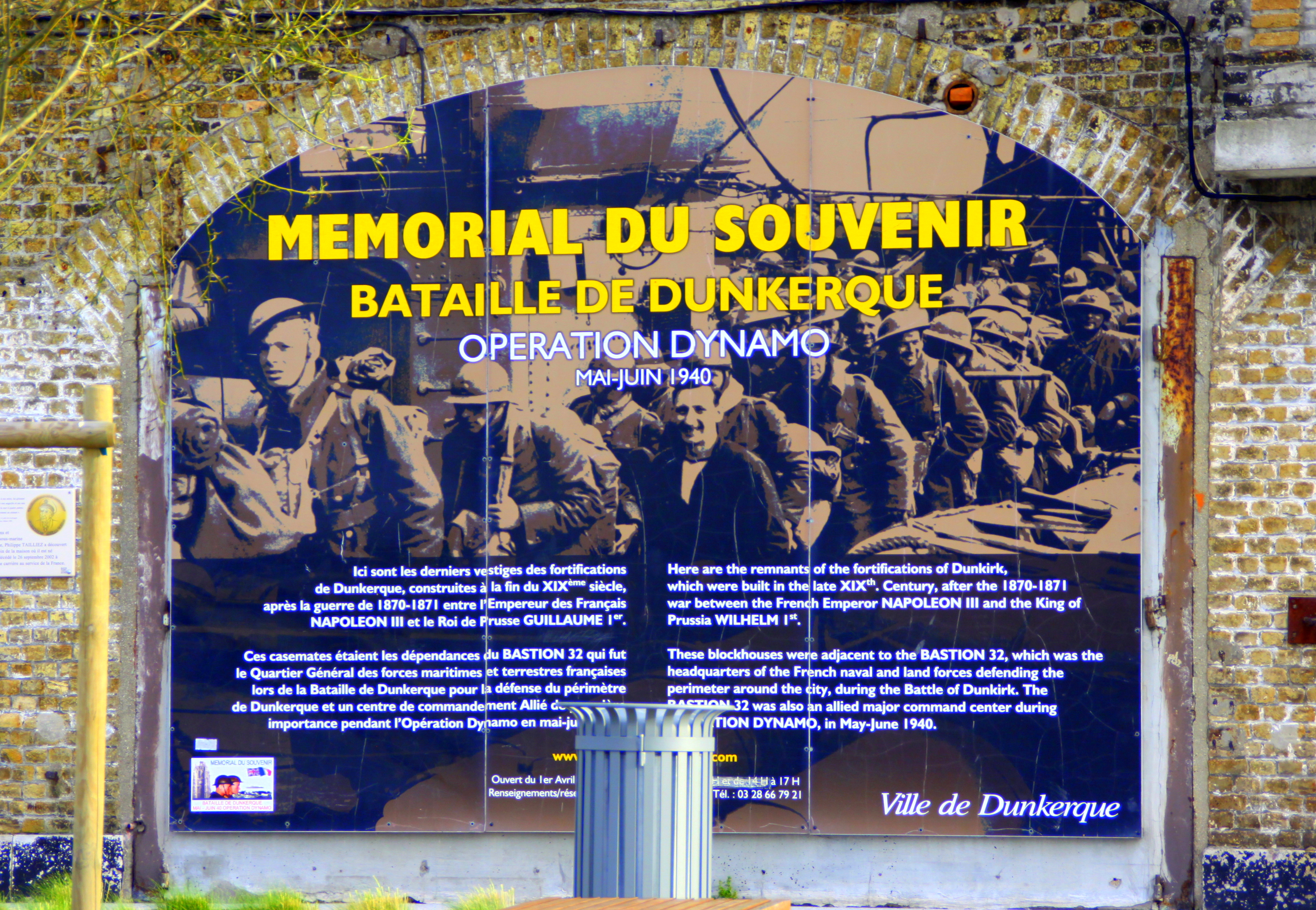 Plakat vun der Operatioun Dynamo op enger Kasemattenentrée zu Dunkerque